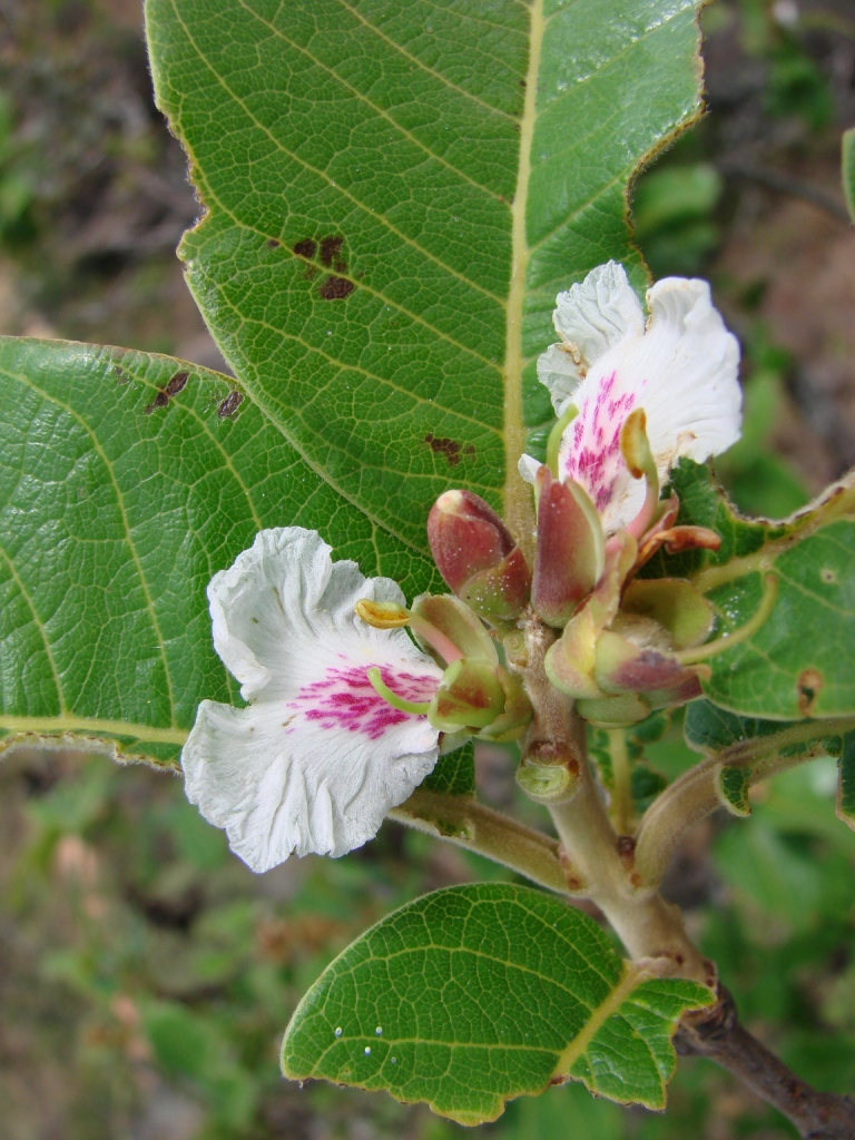 Qualea dichotoma - VOCHYSIACEAE - Parque Estadual da Serra dos Pirineus - Pirenópolis - Goiás - Brasil.